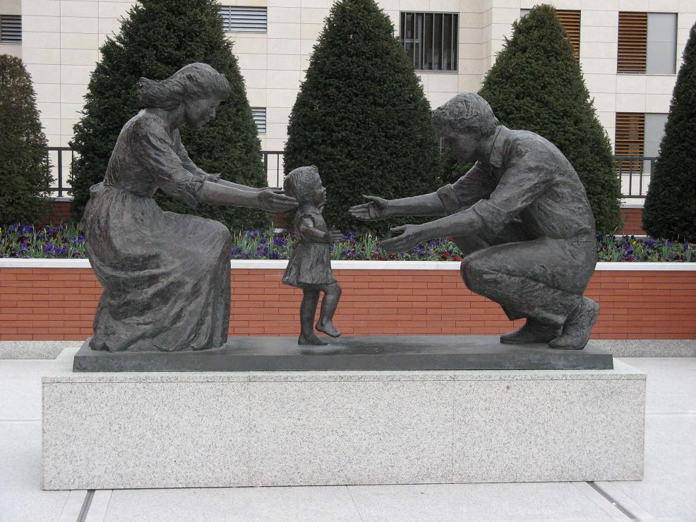 Escultura junto al templo de la IJSUD, Madrid, España, Spain